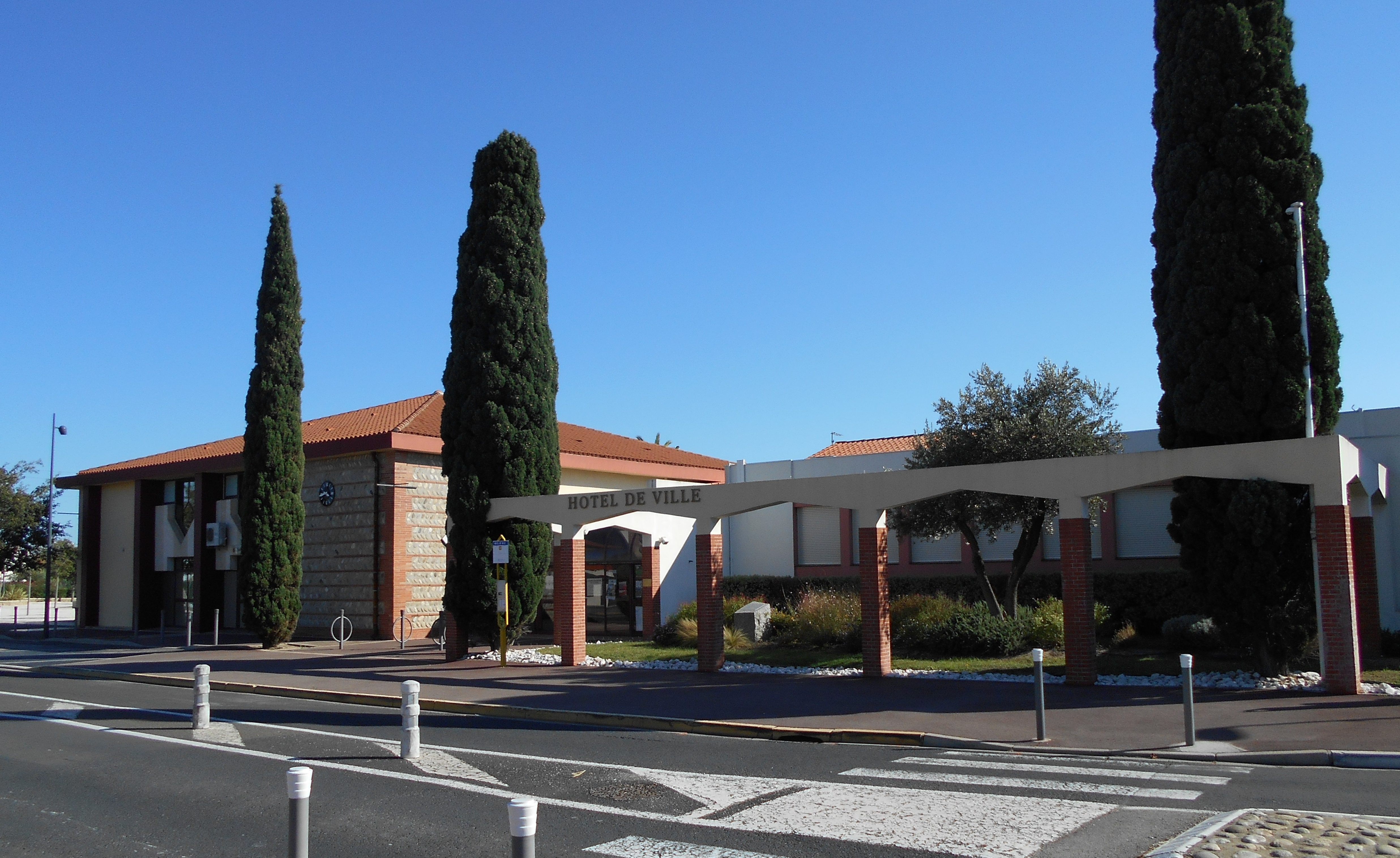 La Casa del Comú de Salelles